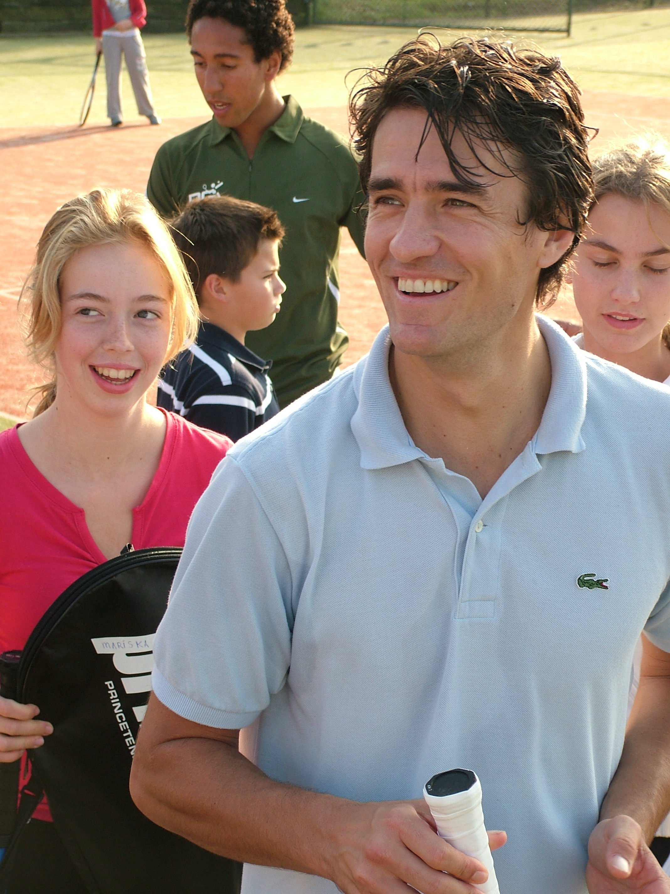 John van Lottum